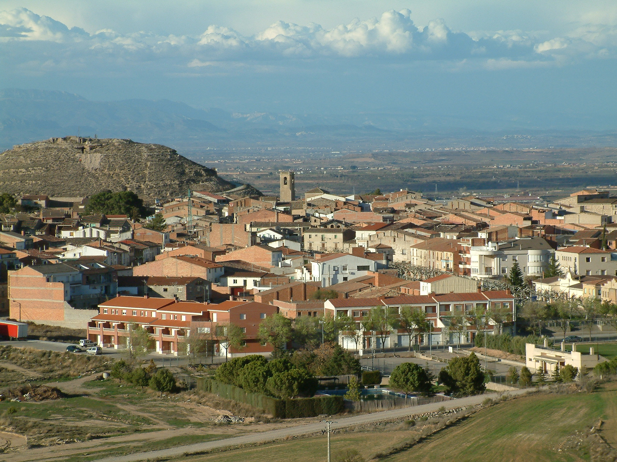 Vistas del pueblo - 2005.03.27 -Castelldans - Pasqua Florida - Passejada fins a l'Hermita